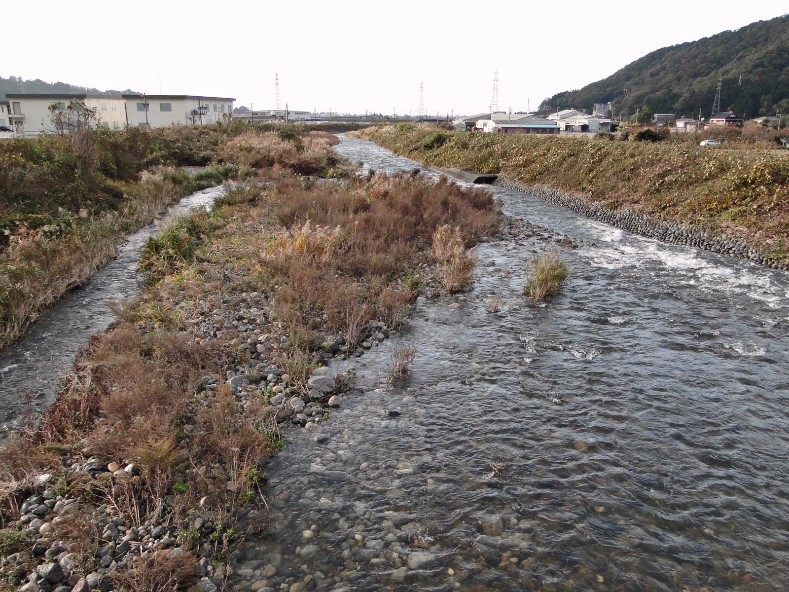 黒部市中陣橋下流、魚津市から撮影。